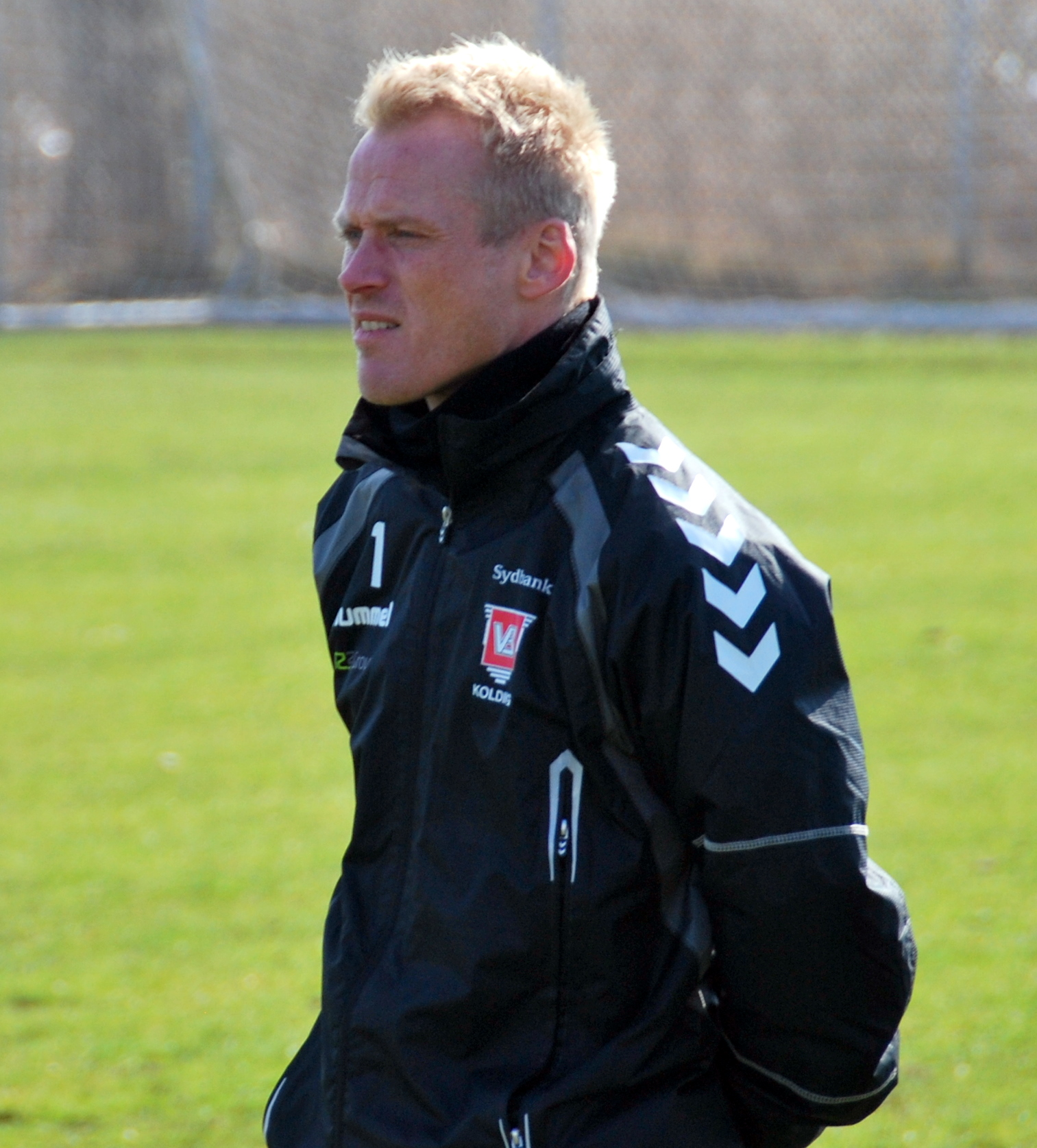 Cheftræner Nicolai Wael fra Vejle Boldklub Kolding. Her under en testkamp mod Viborg FF på VFFs træningsanlæg på Kirkebækvej i Viborg.